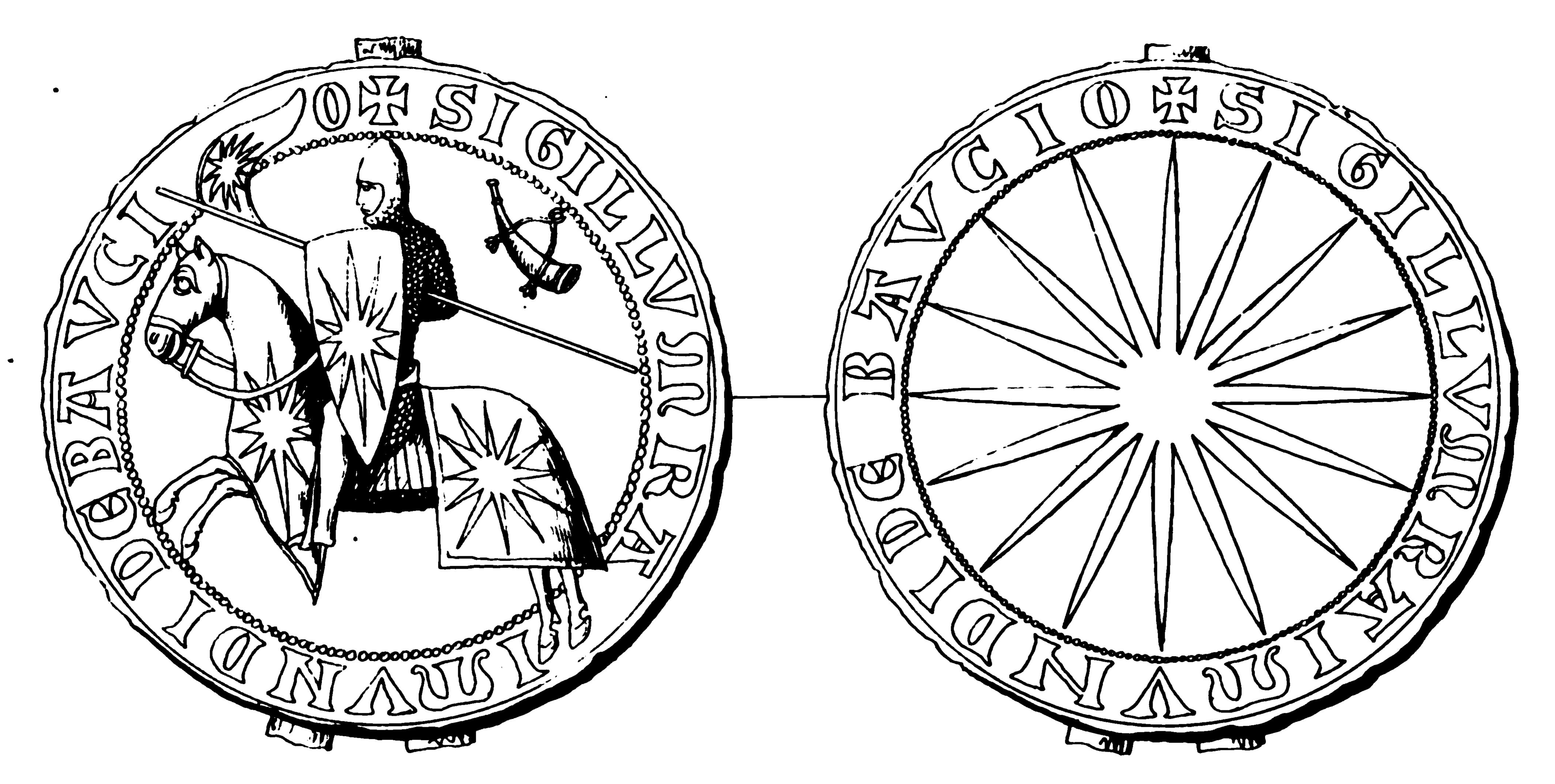 Sceau de Raymond I des Baux, prince d'Orange